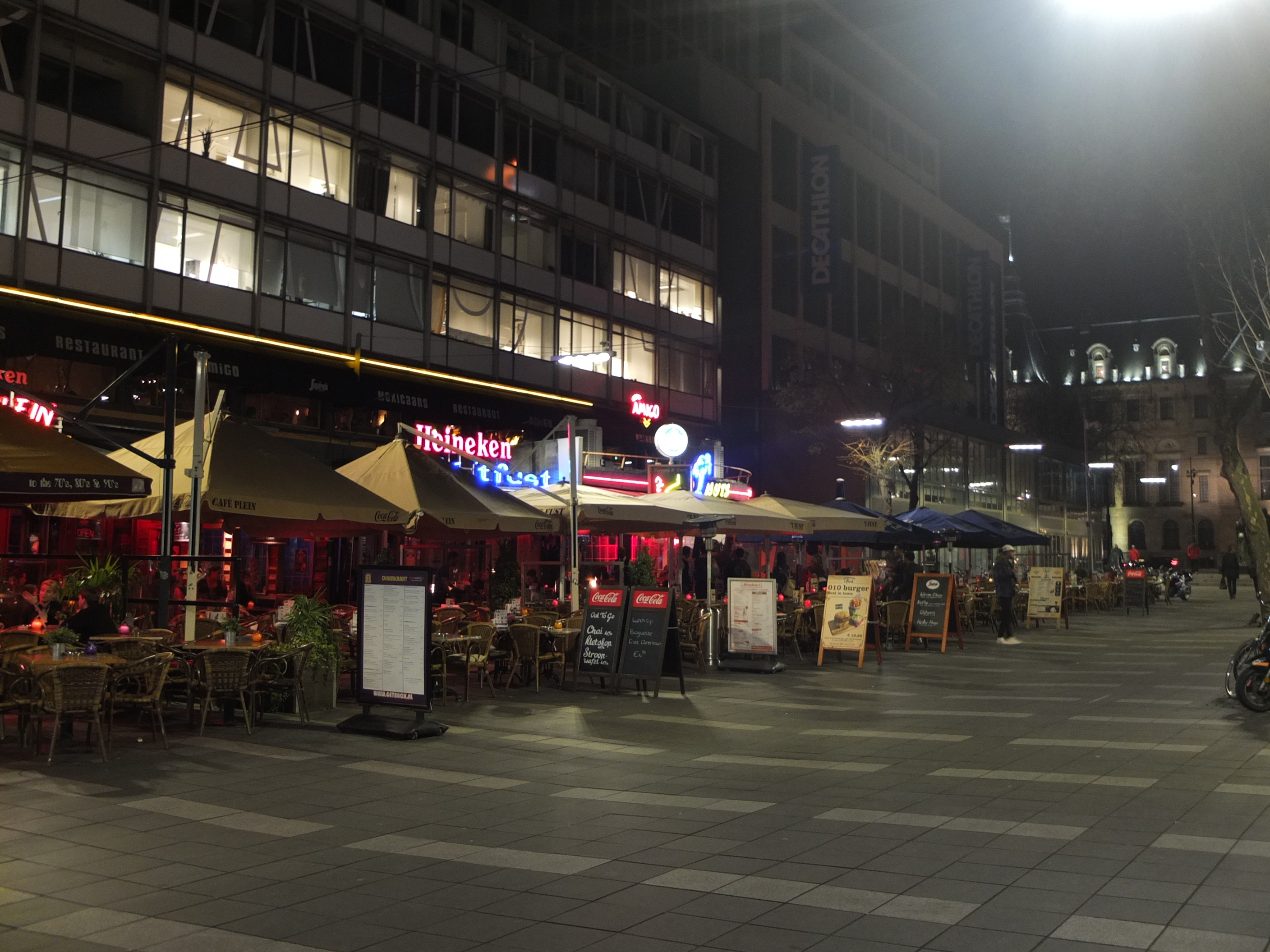 Stadhuisplein by night